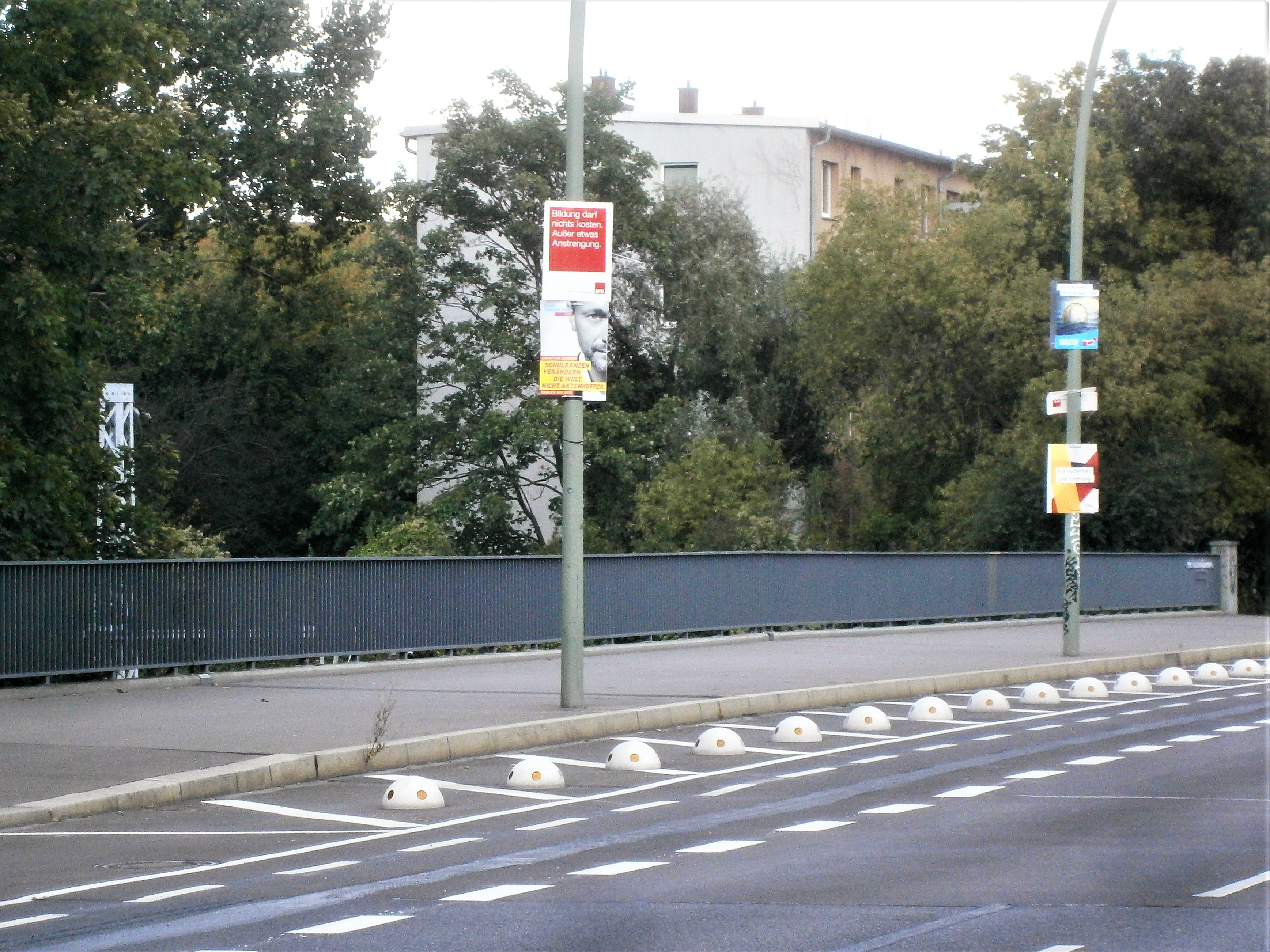 Die Kniprodestraße ist ein Verkehrszug im Berliner Bezirk Pankow, Ortsteil Prenzlauer Berg mit Grundstückszählung in Hufeisen. Bild